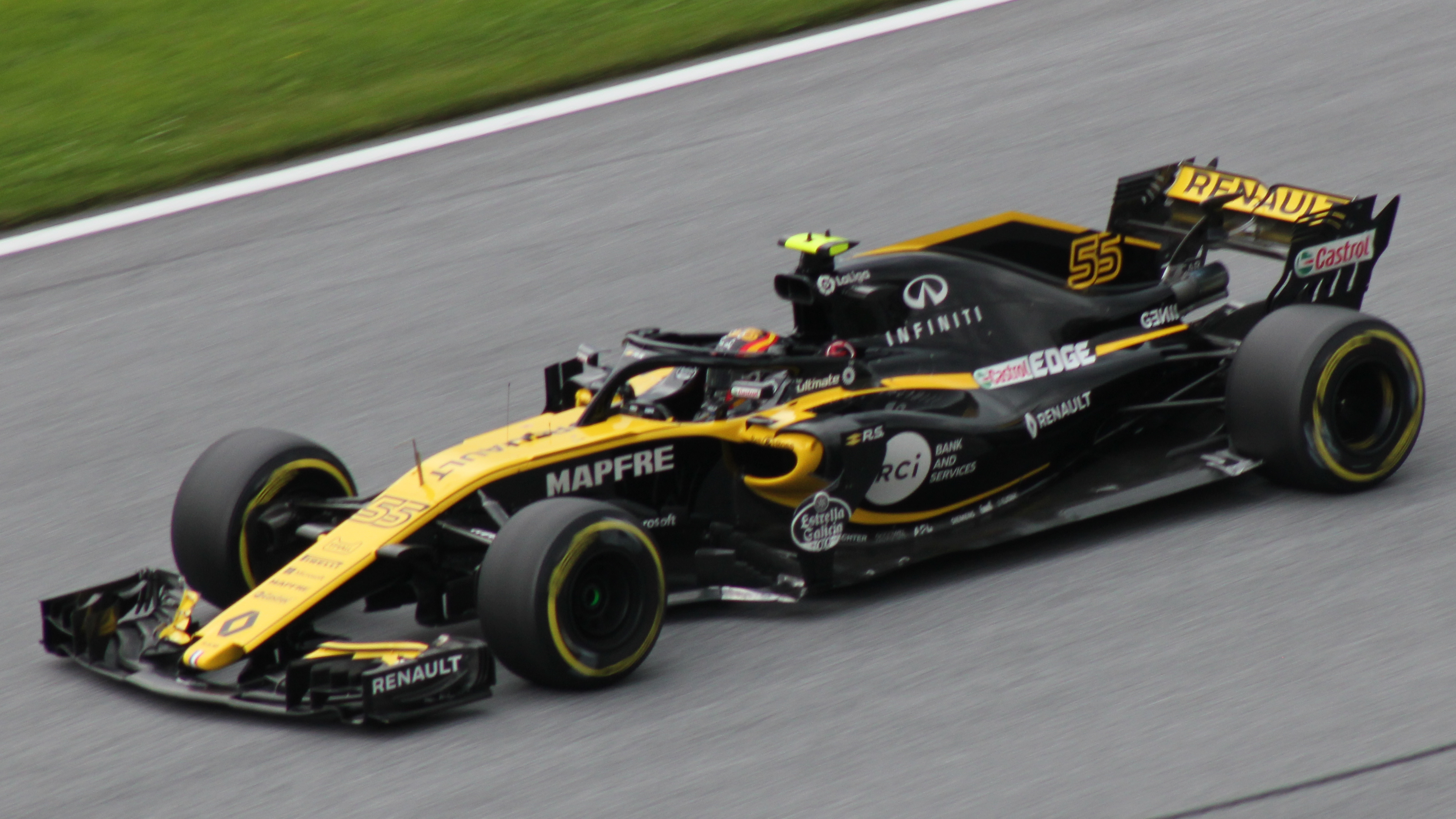 55 Sainz beim Rennwochenende in Österreich 2018